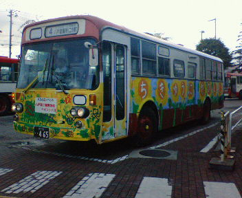 南部バス バスの日ペイントバス K-CJM500小型幕仕様 「八戸ラピアバスターミナル」にて（2006年10月初めに廃車）